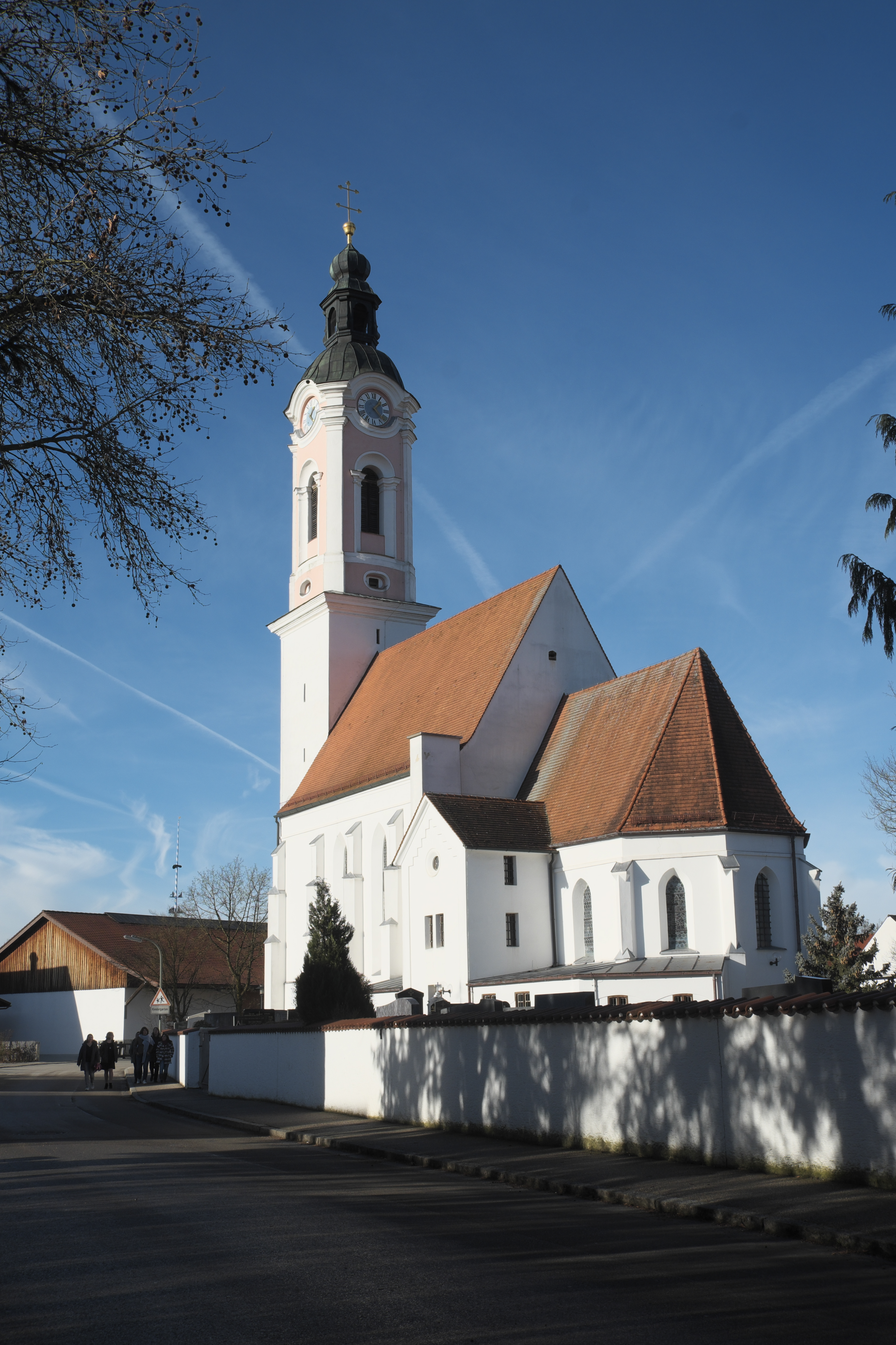 Katholische Pfarrkirche St. Johannes der Täufer in Zolling im Landkreis Freising (Bayern/Deutschland)